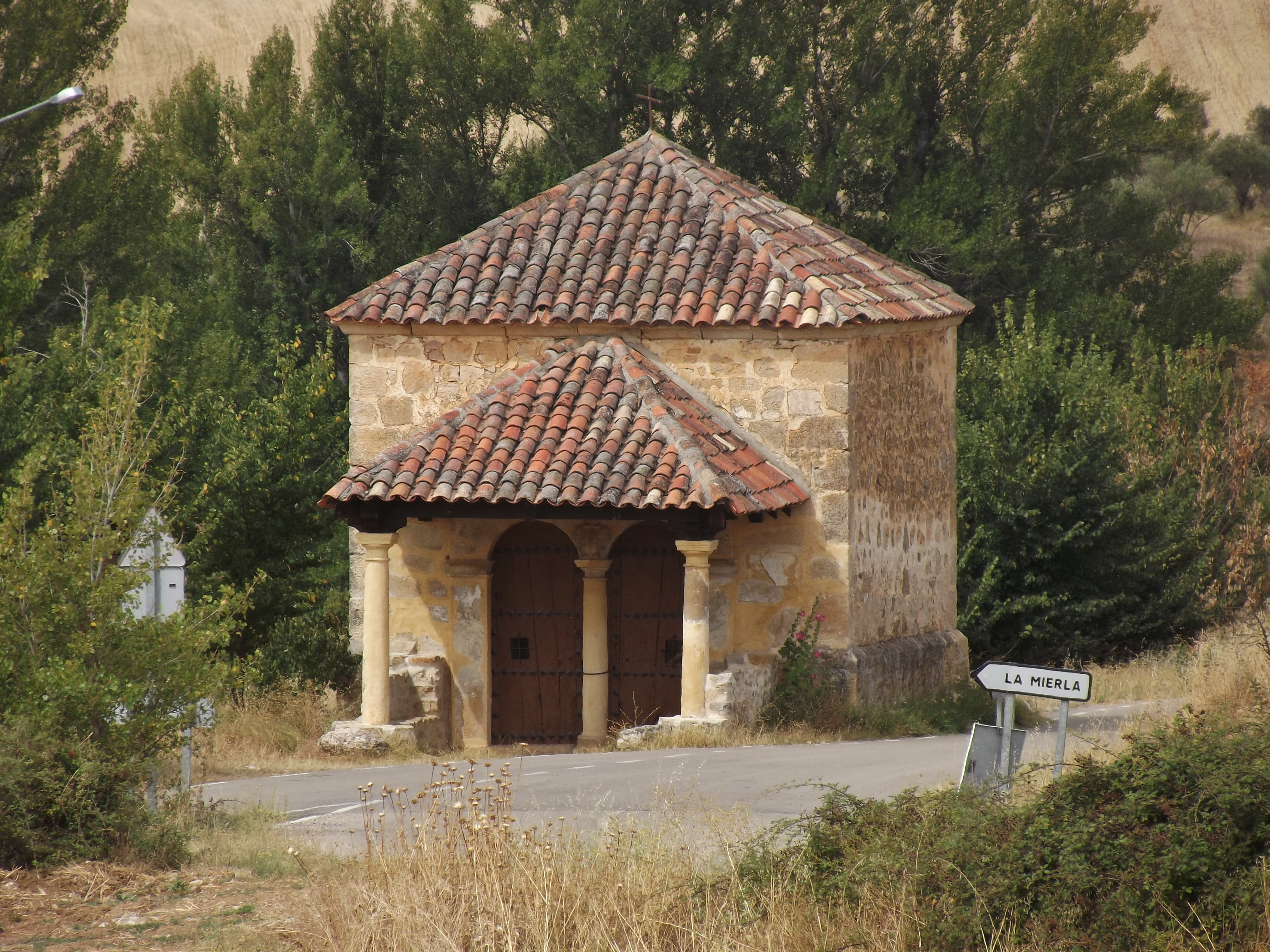 Ermita de la Soledad, La Mierla, Guadalajara, España